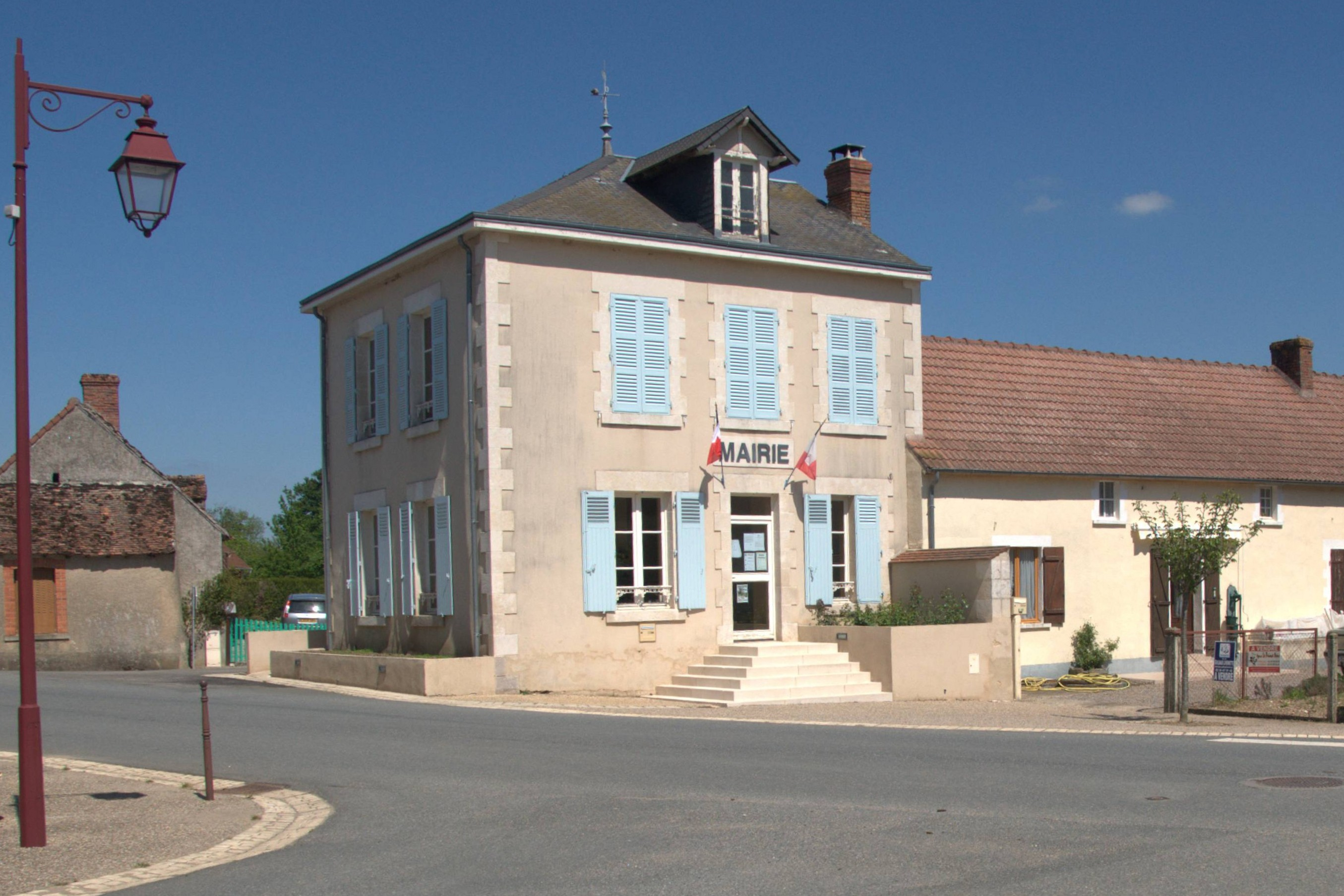 Mairie de Bonneuil (Indre)